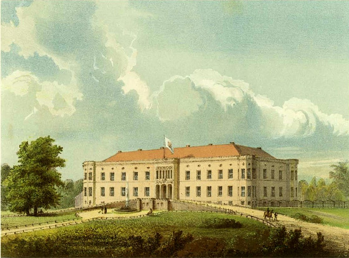 Schloss Vogelsang, Landkreis Uckermünde, Provinz Pommern